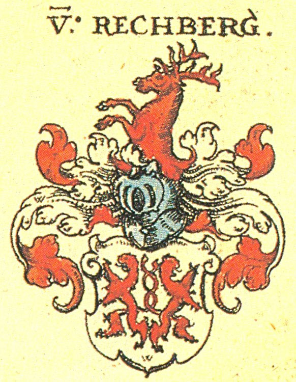 Ritterschaft und Adel in Schwaben von Rechberg